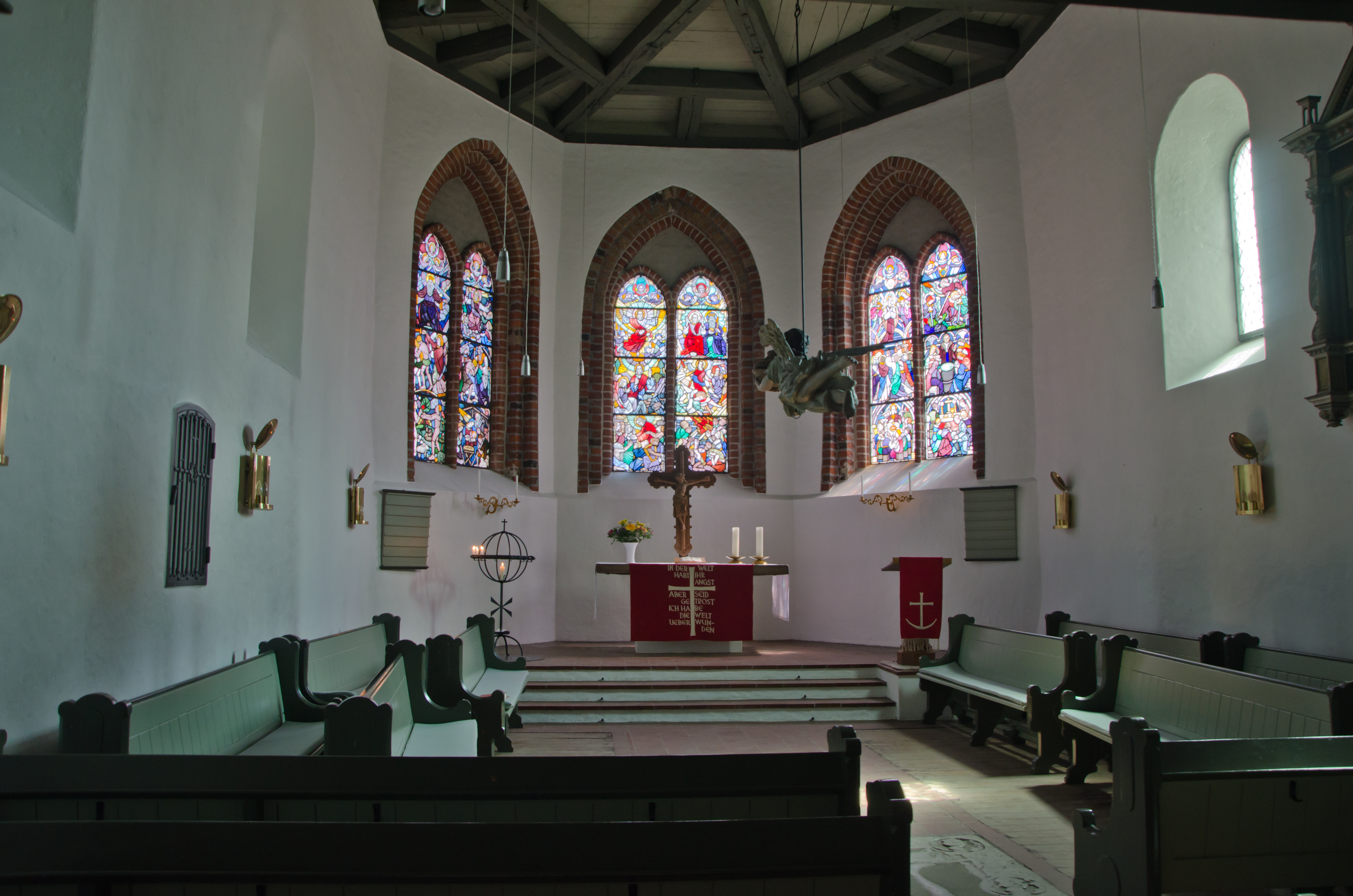 Preetz Kirche Chor